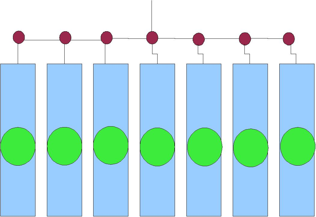 schéma d'une structure de projet fonctionnelle Benoit Minaudier